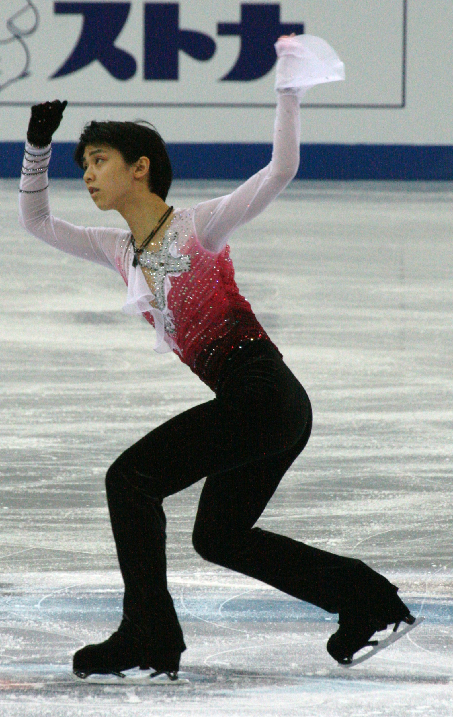 Юдзуру Ханю (Япония) на на финале Гран-при 2012-2013. Произвольная программа.